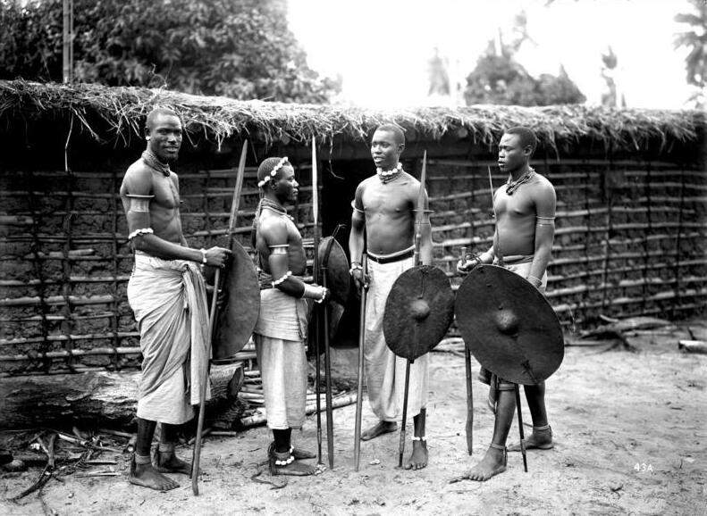 Leute aus der Gegend von Kondoa Irangi, Ufiome